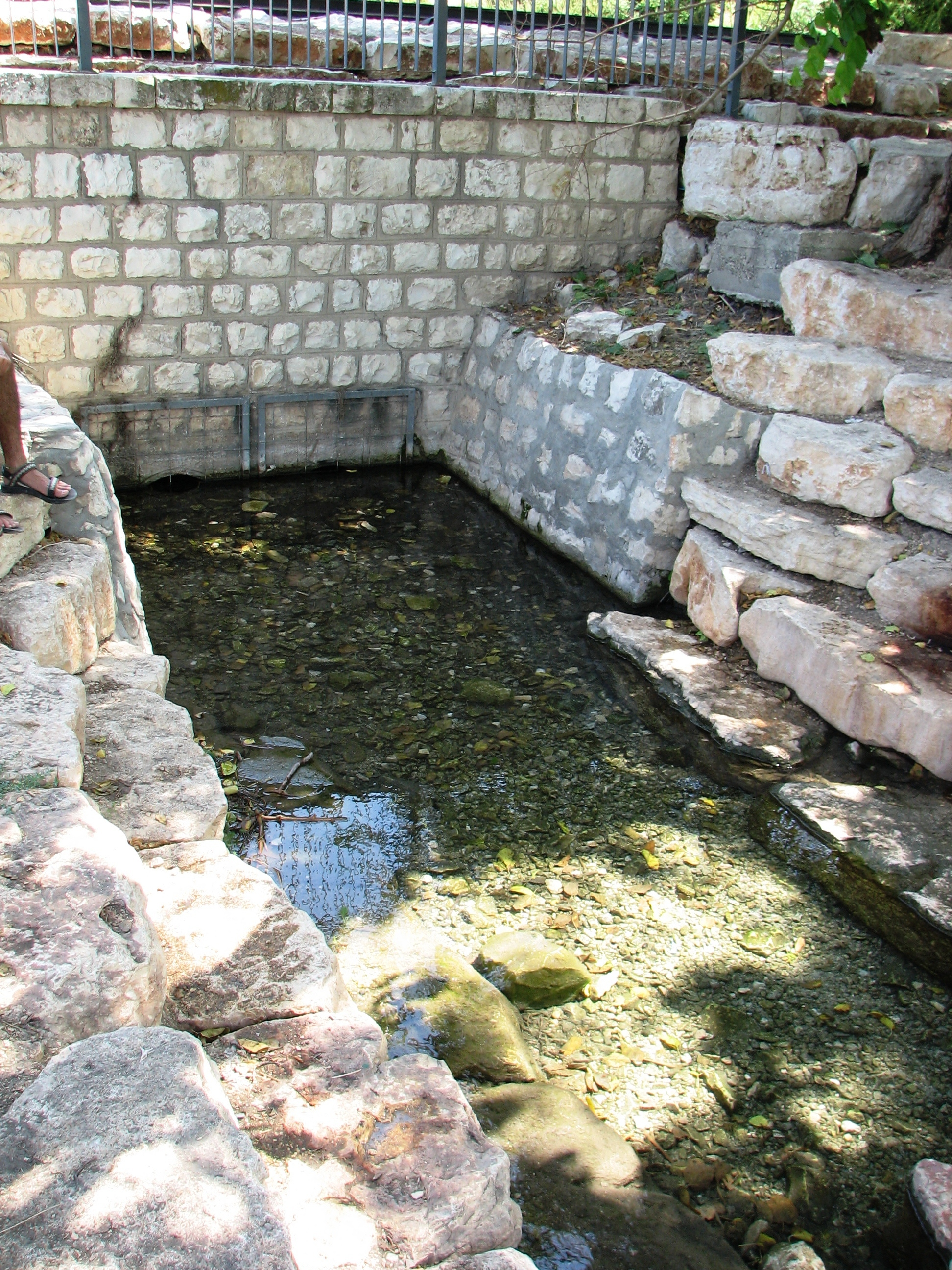 Alroy spring Flowing to the Kishon river near Kiryat Tivon in Israel. מעיין אלרואי נובע ליד שכונת אלרואי בקרית טבעון נשפך לנהר הקישון. ליד המעיין הוקם פארק קטן הכולל קטע מנהר הקישון מי המעיין זורמים מתחת לגשר מסילת רכבת העמק